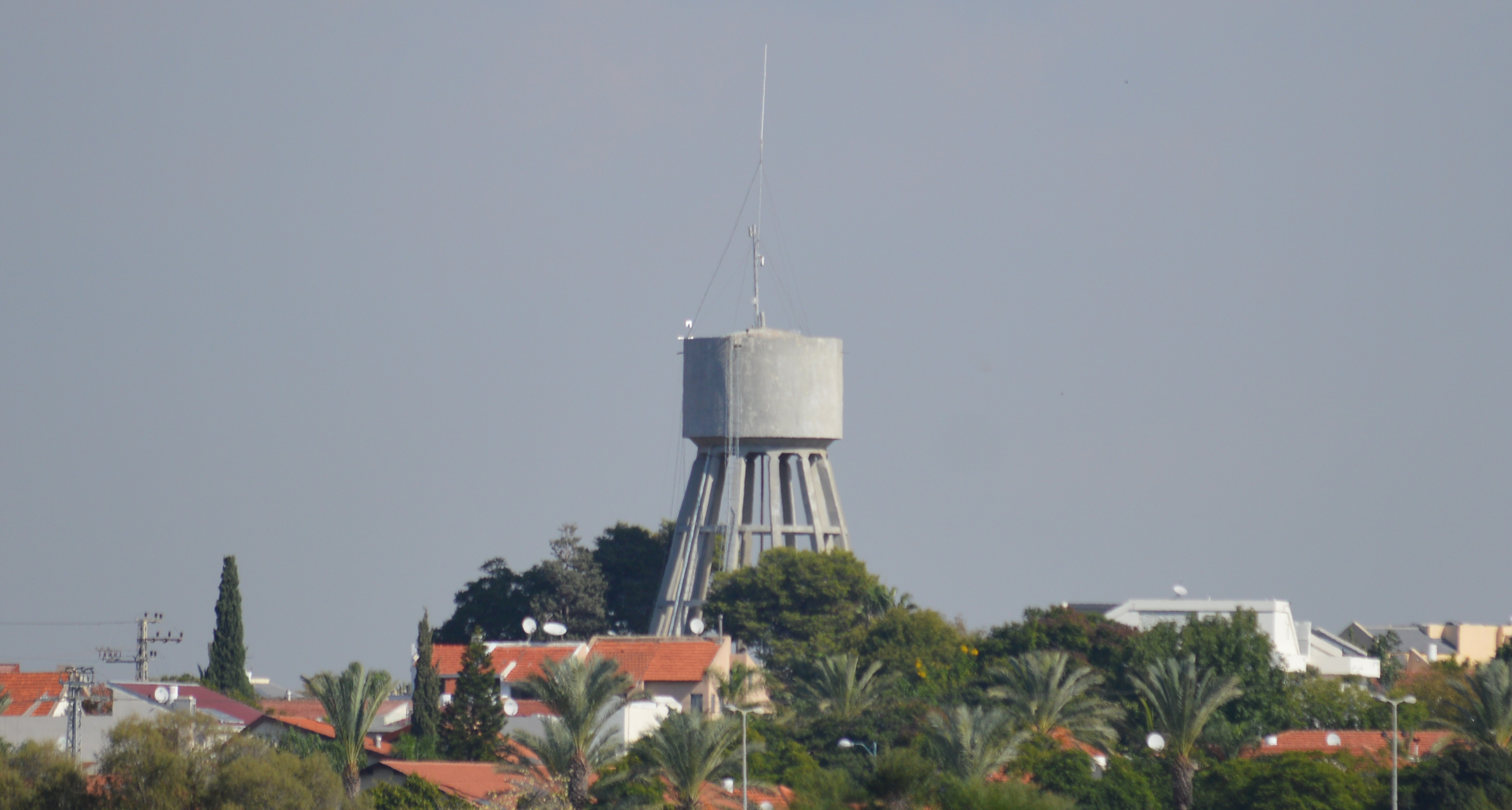 מגדל מים ברעננה